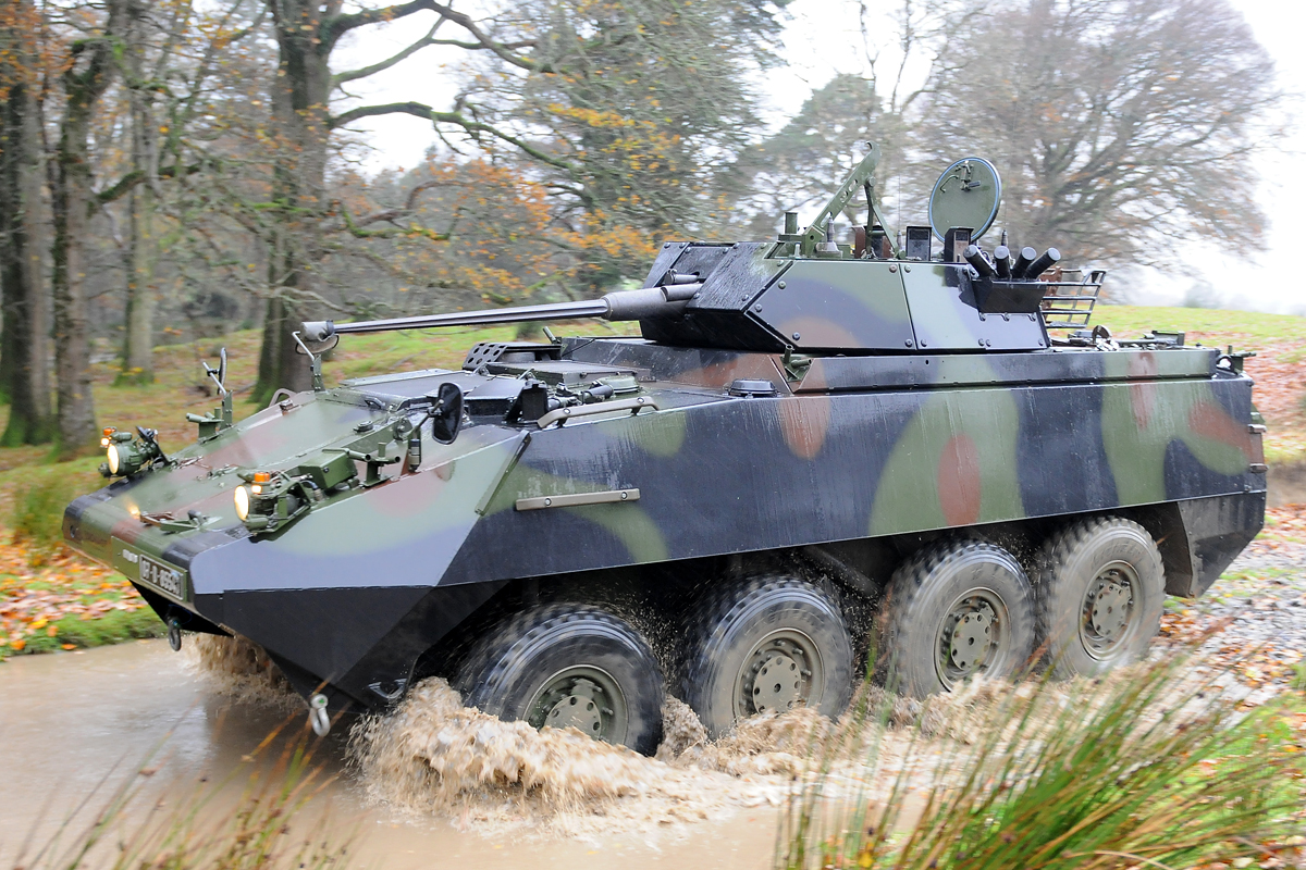 MOWAG